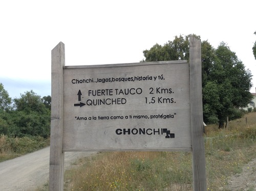 Indicación de acceso al Fuerte Tauco, en Quinched, Chonchi, Chile. El cartel dice:"Chonchi, lagos, bosques, historia y tú.FUERTE TAUCO 2 Kms.QUINCHED 1,5 Kms."Ama a la tierra como a ti mismo, protégela"CHONCHI"